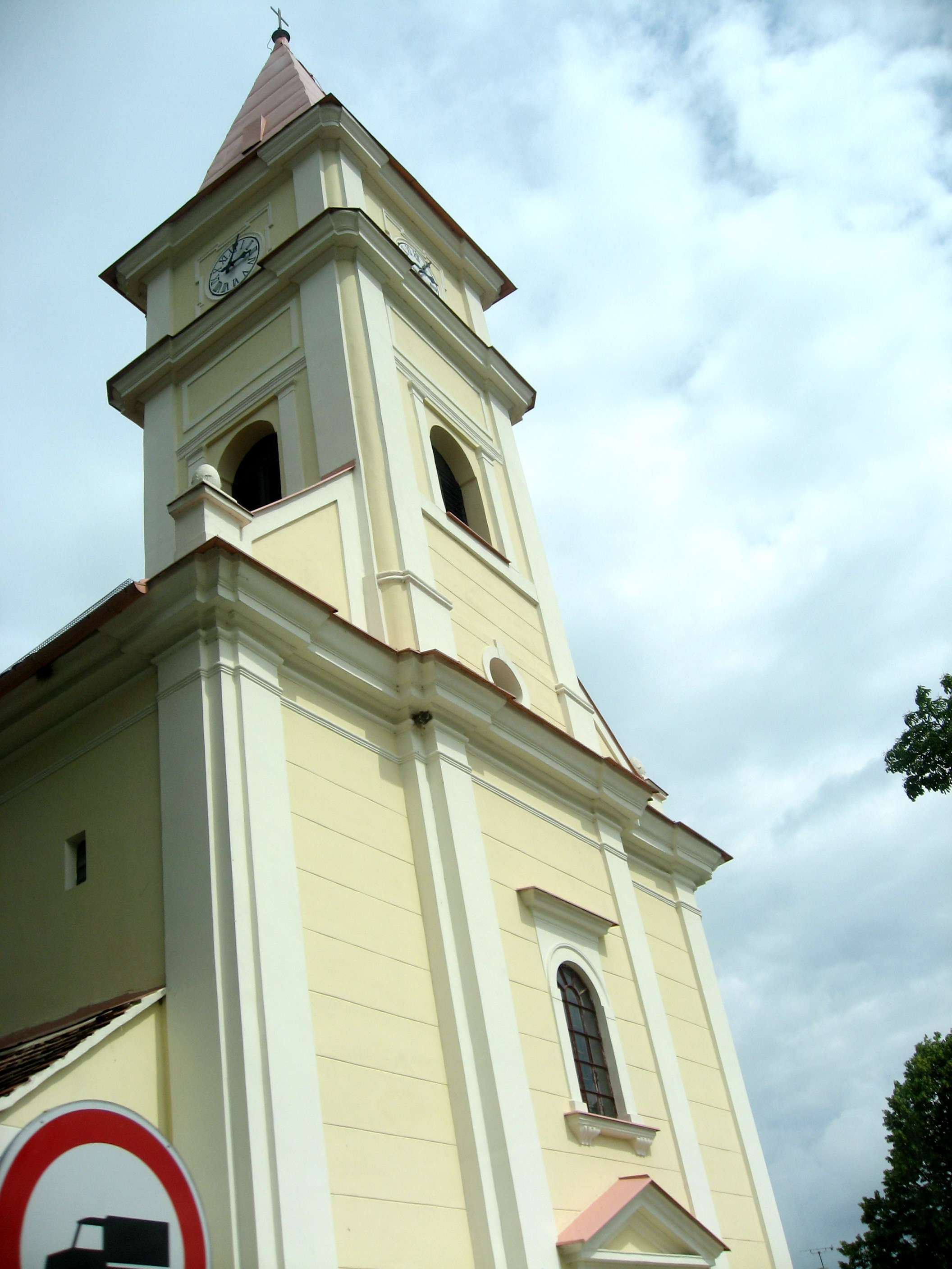 Kostel Nejsvětější Trojice v obci Bratčice